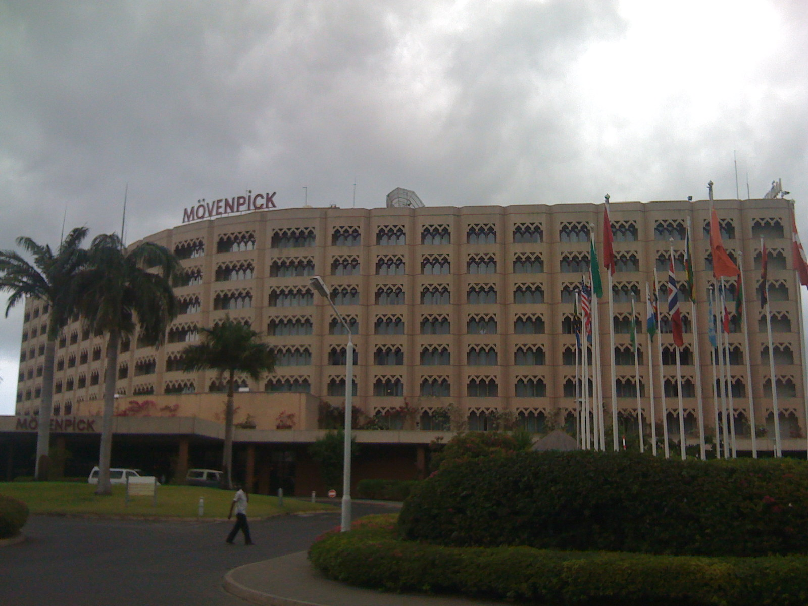 Movenpick Dar es SAlaam